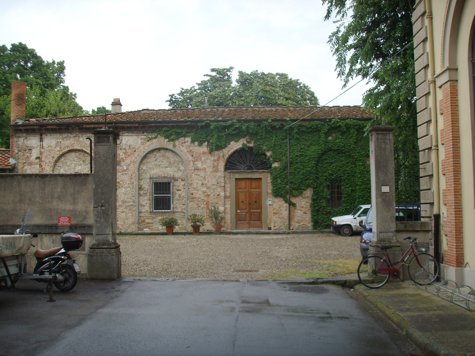 Palazzina reale delle cascine, edificio satellite 04